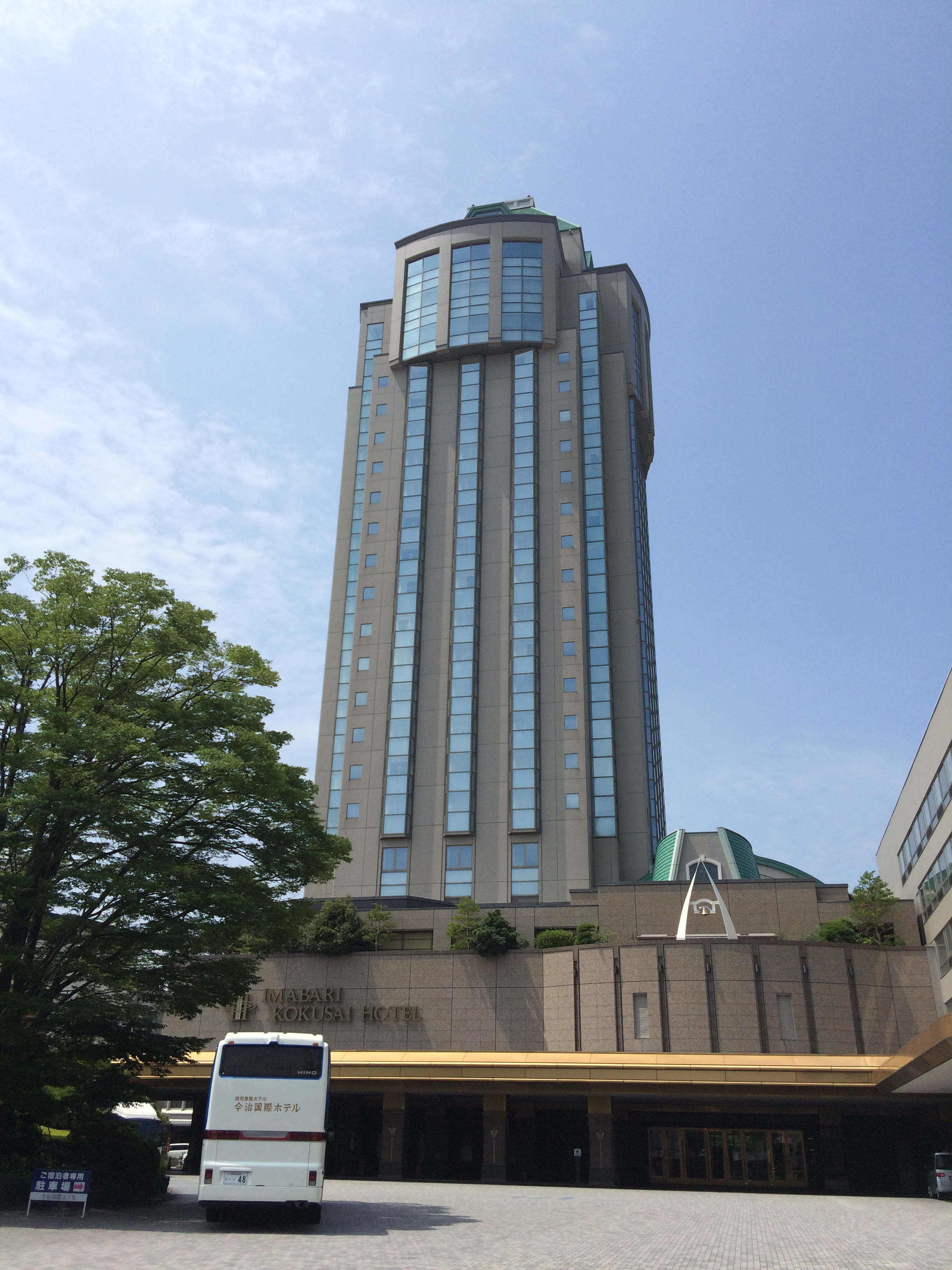 愛媛県今治市旭町2丁目3番地4にある今治国際ホテル。